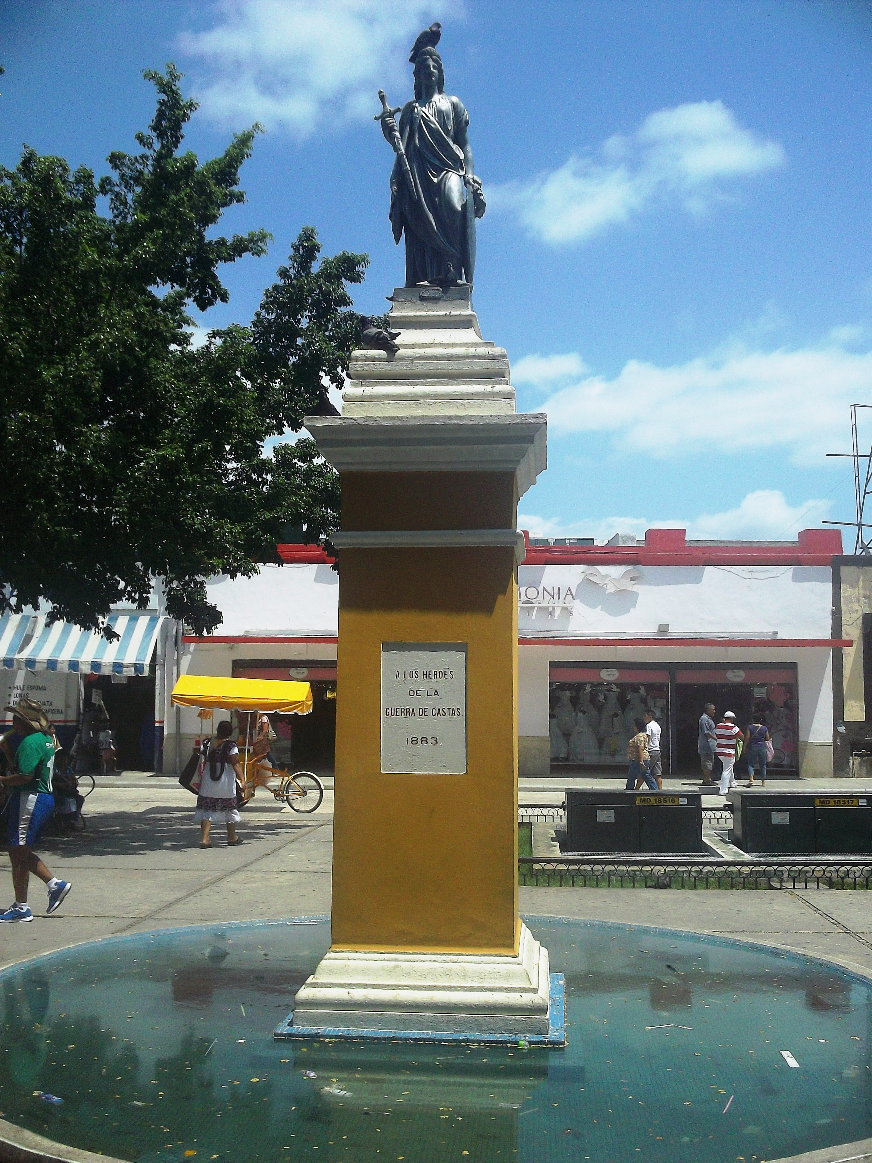 Monumento erigido en 1883 en el parque Eulogio Rosado a los héroes de la Guerra de Castas. Por la antigüedad del monumento y por la libertad de panorama, está en dominio público y puede ser fotografiado libremente.